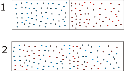 Прелазак термодинамичког система из мање вероватног у вероватнији облик. Други принцип термодинамике Милија Јовичић